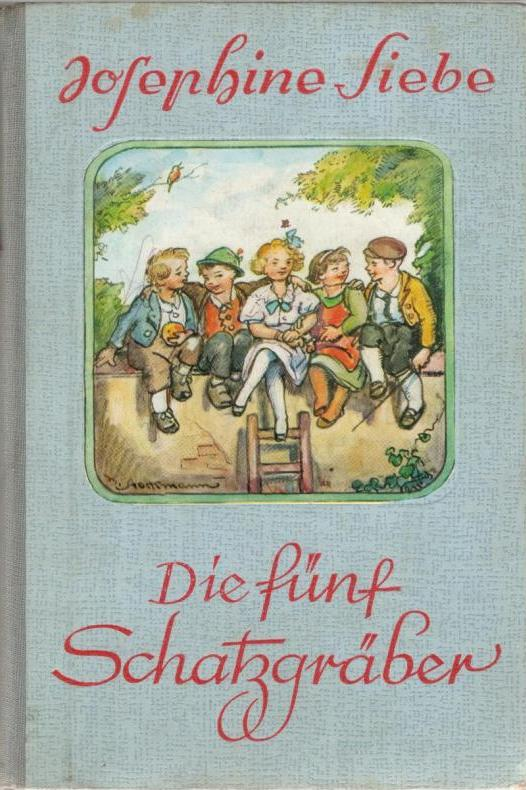 Vorderer Buchdeckel Josephine Siebe, Die fünf Schatzgräber, Bild von Hermann Stockmann